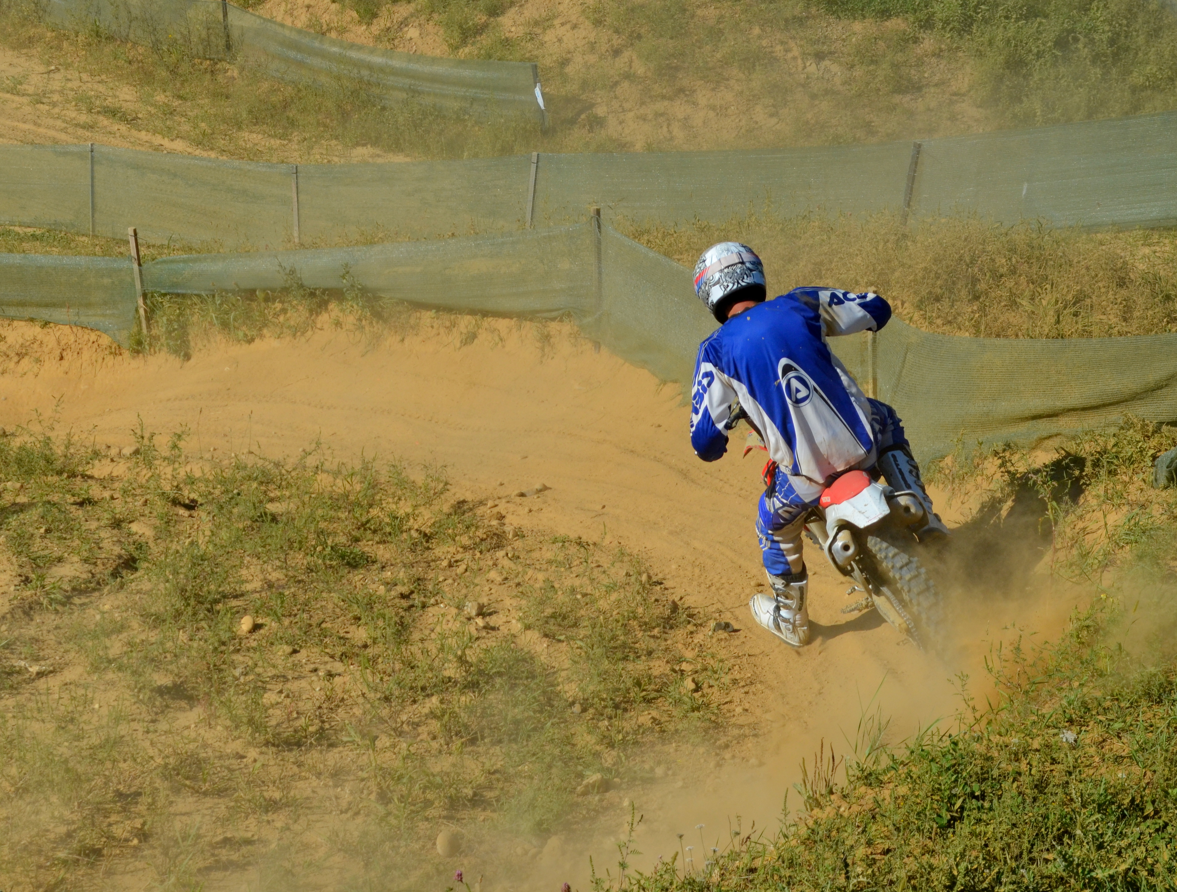 Flèche motocycliste de Beynost, le 30 août 2014 : pratique du motocross à Beynost.